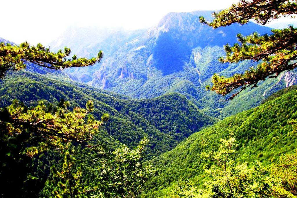 Перучица 1